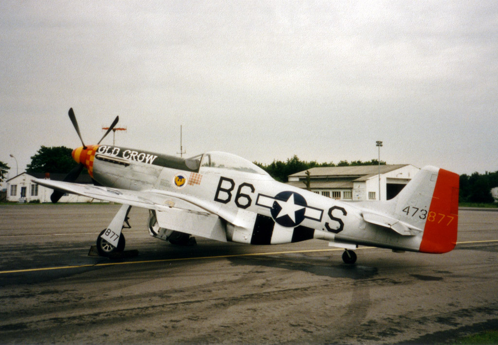 Beschreibung: P-51D-25NA Mustang auf dem Barther Flughafen Fotograf: Darkone first upload at de.wikipedia 21:55, 4. Nov 2004 by Darkone